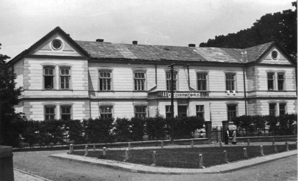 Szpital w Sanoku przy ulicy Konarskiego w okresie okupacji niemieckiej (1939-1944, Kreiskrankenhaus)